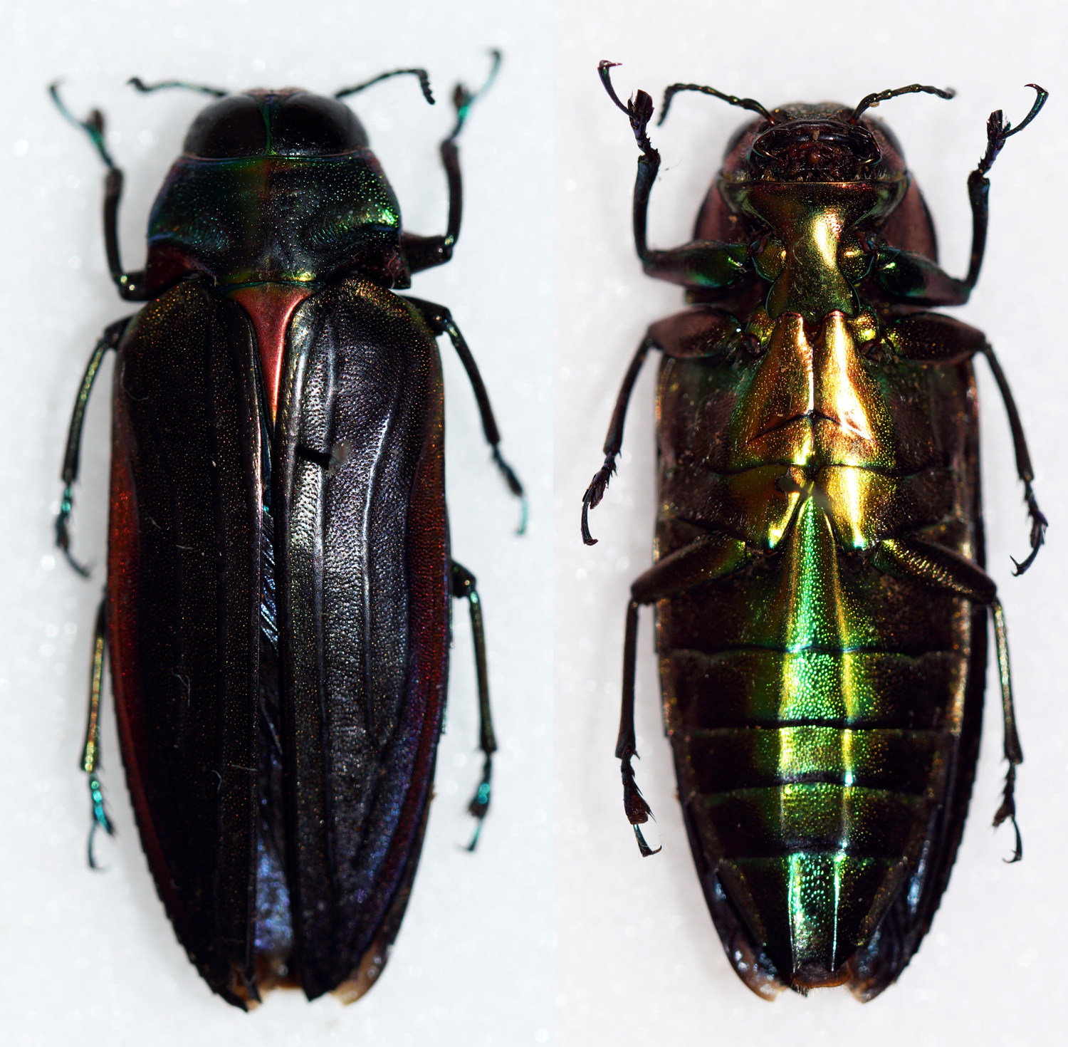 Deyrolle,1864 Sex: Female Data: 04- 2014 - Cabanglasan - Bukidnon - Mindanao - Philippines Size: ?